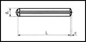 DIN 1473